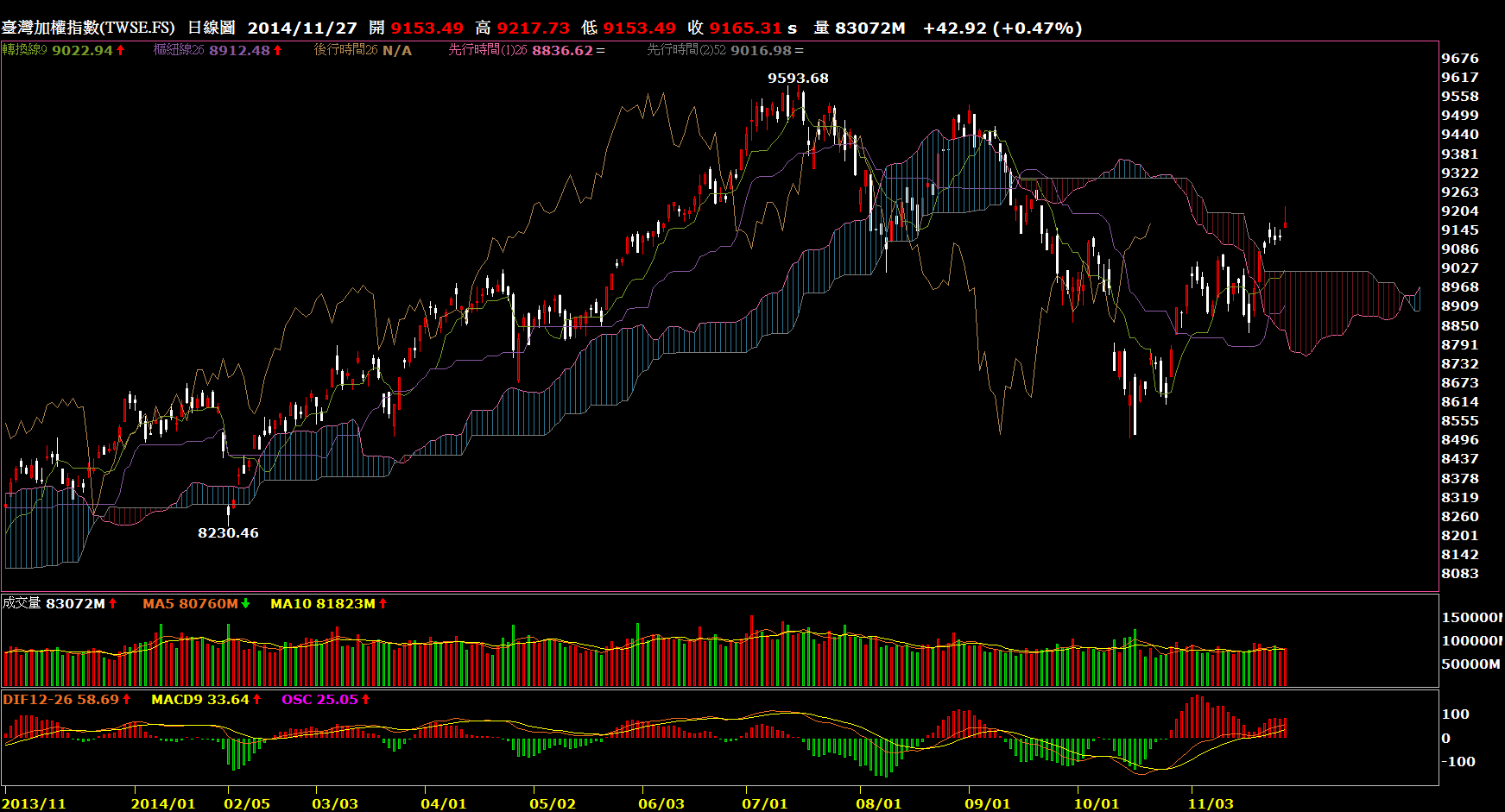 一目均衡表（いちもくきんこうひょう，ICHIMOKU KINKO HYO），技術分析。